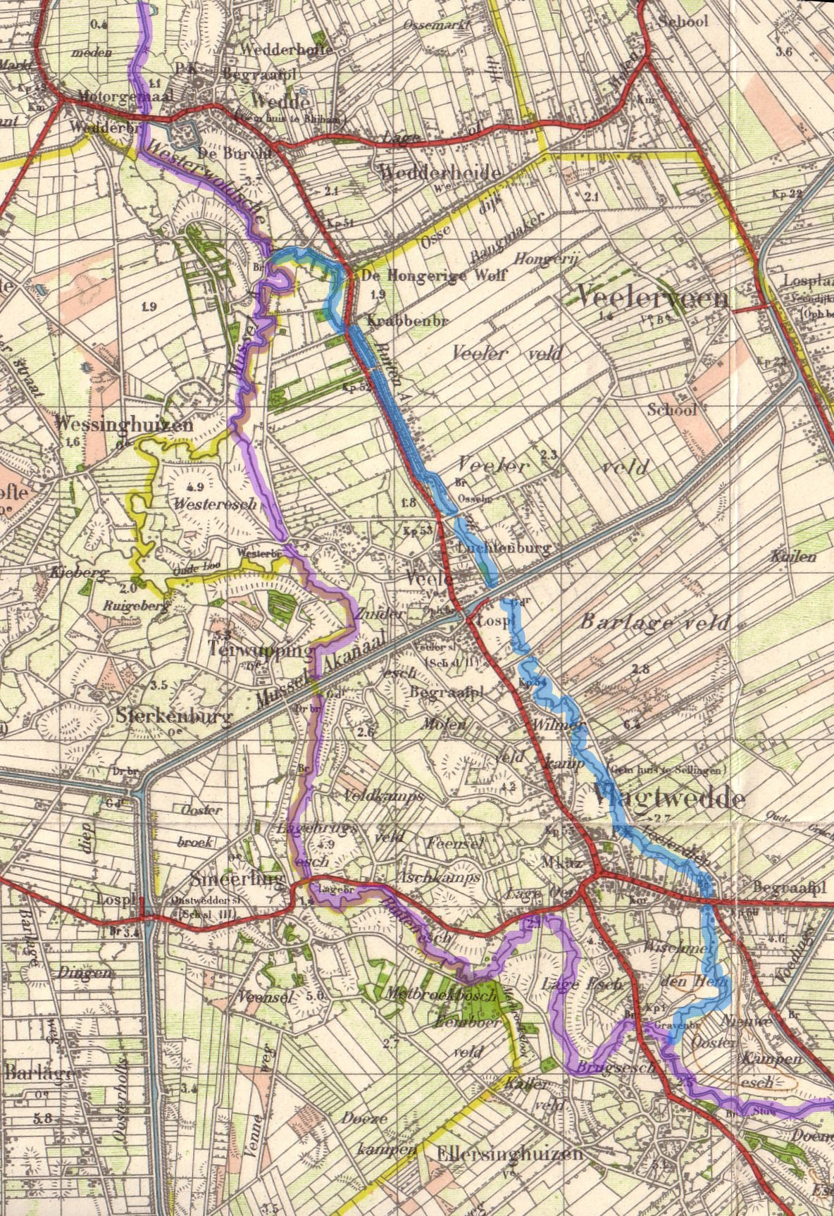 De Ruiten Aa van Vlagtwedder Veldhuis tot voorbij Wedde op de topografische kaart van 1933 (verkend in 1932). De hoofdloop van de Ruiten Aa is met paars geaccentueerd en het Veelerdiep met blauw. De auteursrechten zijn voorbehouden aan de Staat der Nederlanden en aangezien de kaart ouder is dan 70 jaar zijn ze vervallen. Accentuatie toegevoegd door Marco Roepers . Indien dit gezien wordt als een creatieve toevoeging dan wordt de afbeelding hierbij door mij onder multilicensie geplaatst. Indien het geen creatieve toevoeging is dan valt de afbeelding binnen het publieke domein.